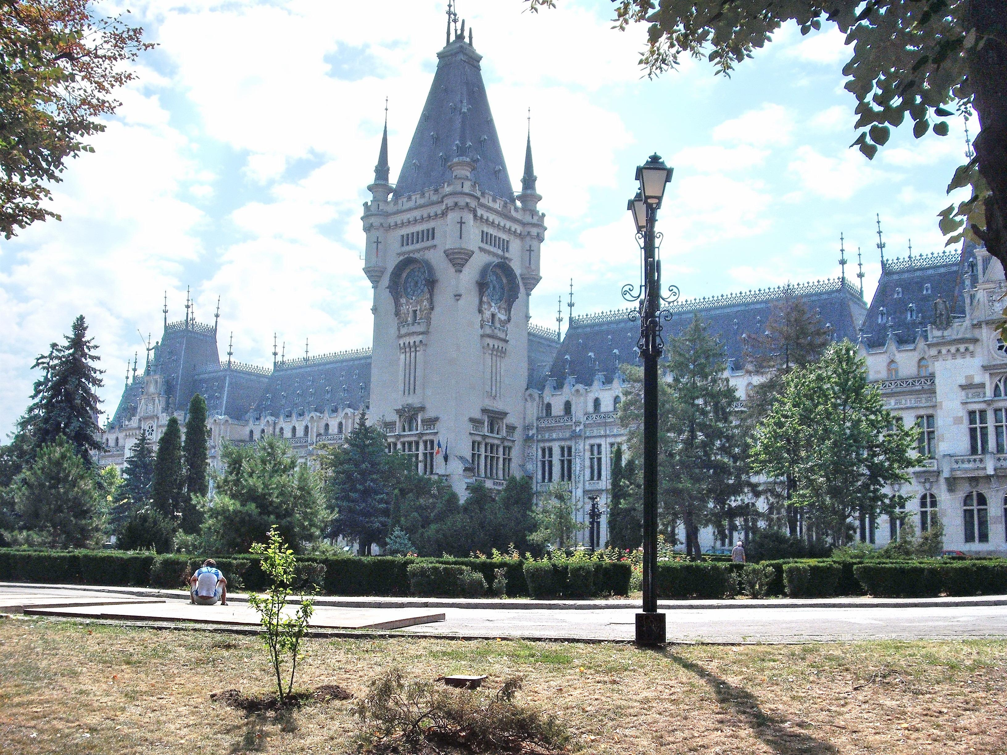 Palatul Culturii din Iaşi 01